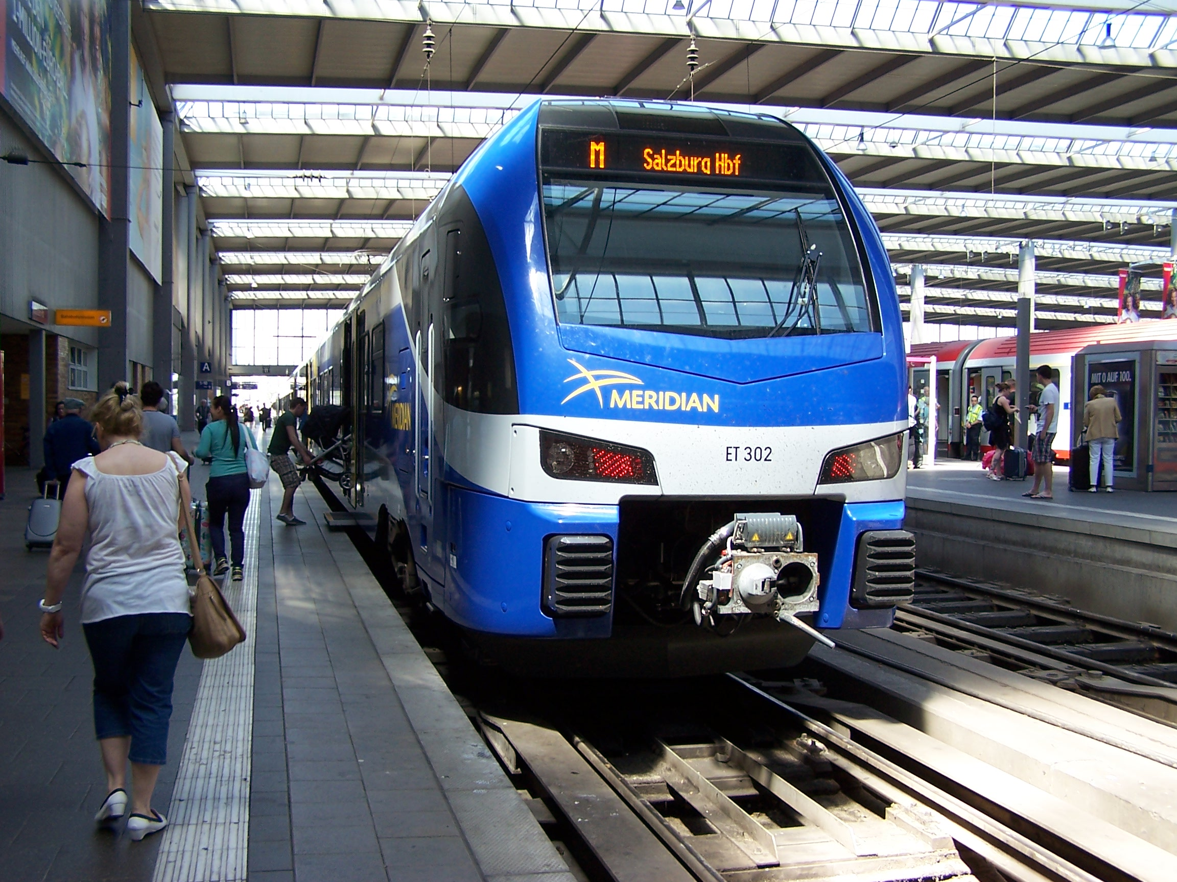 Meridian ET 302 in München Hbf